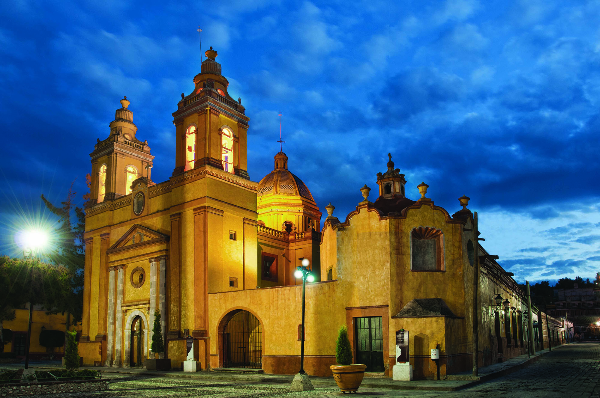 Cadereyta pueblo